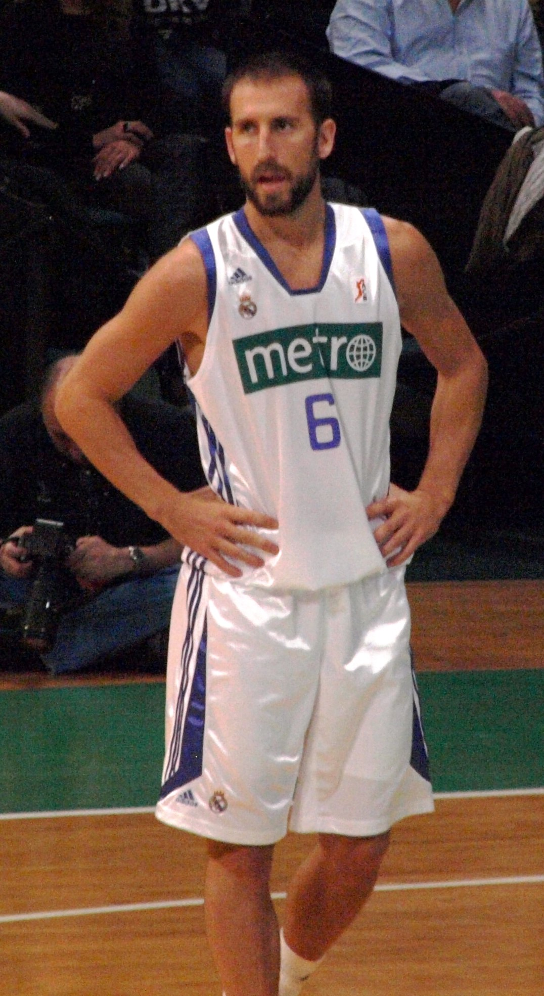 Pepe Sánchez con el Real Madrid en el Olímpico de Badalona en noviembre de 2008